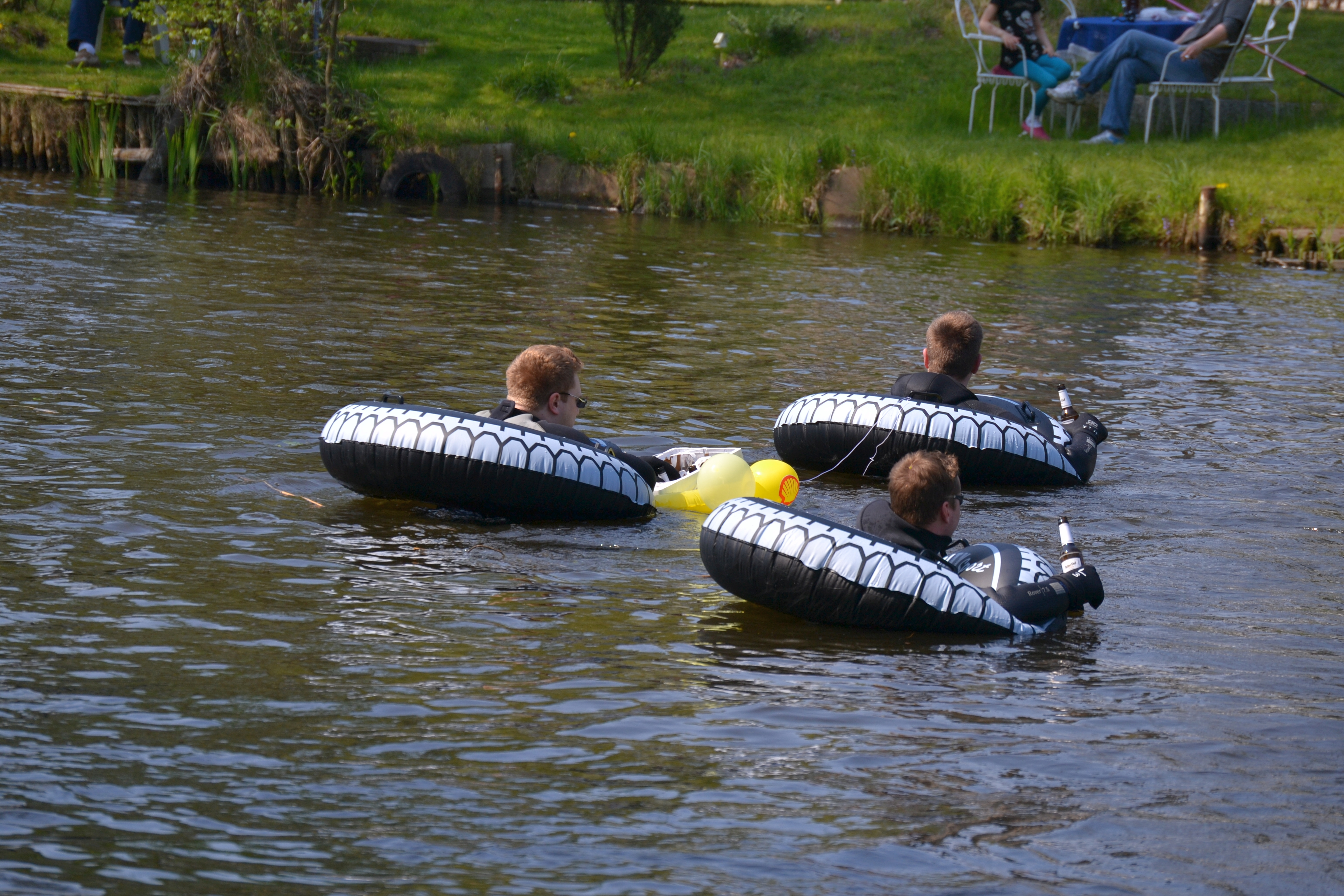 17. Spreetreiben von Neu Zittau nach Erkner am 19. April 2014 kurz hinter dem Start an der Brücke Neu Zittau